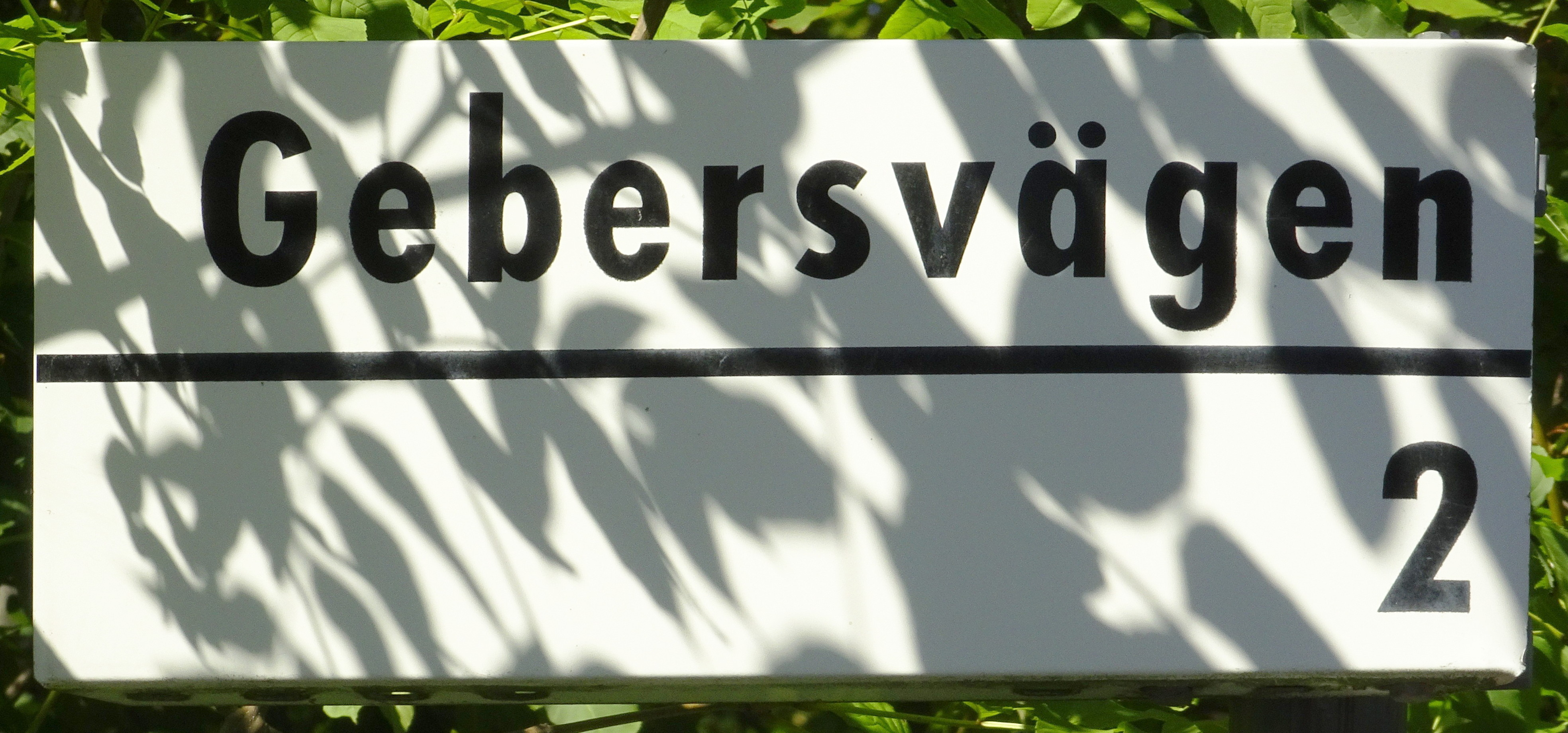 Gebers konvalescenthem, gatuskylt